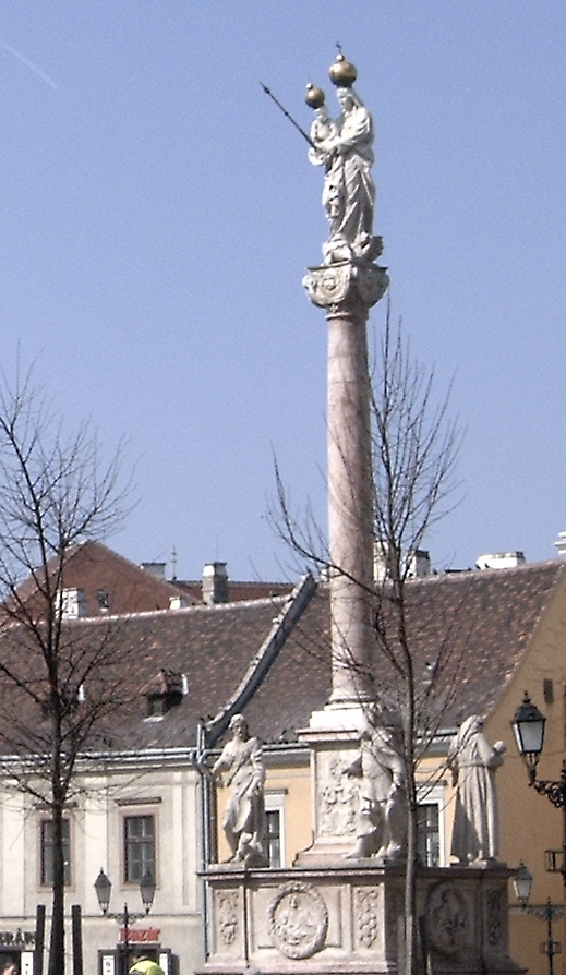 A Mária-oszlop a Széchenyi téren (Győr, Győr-Moson-Sopron megye)